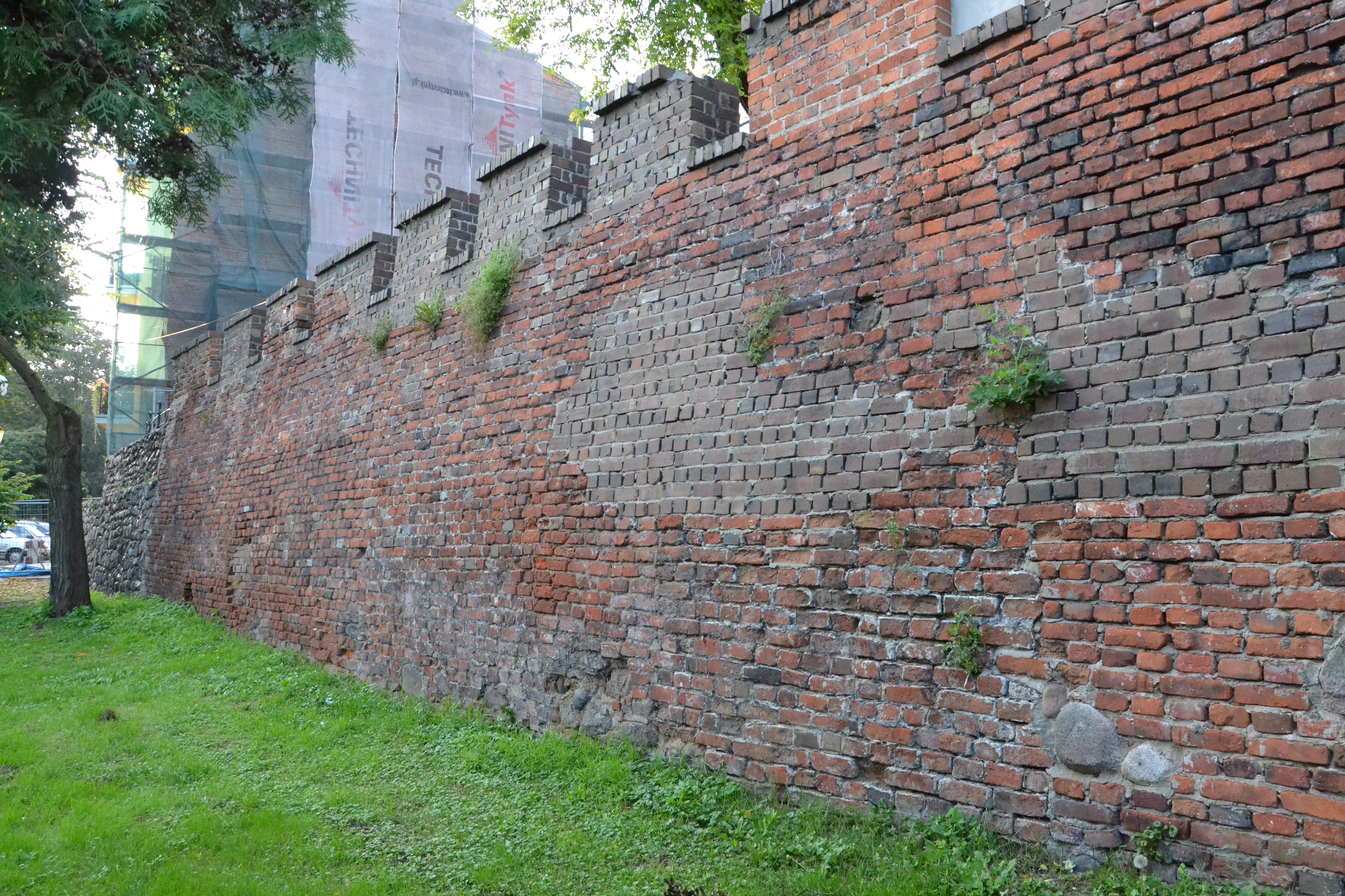 Piotrków Trybunalski, mury obronne (pozostałości), XIV